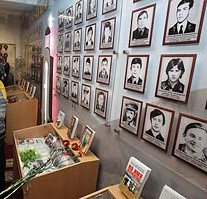 Музейная комнаты, посвященная памяти воинам-афганцам.В гимназии г. Житковичи .